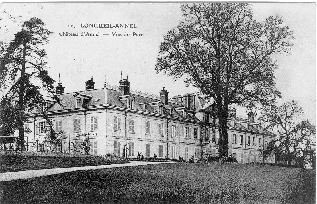 Carte postale du château d'Annel